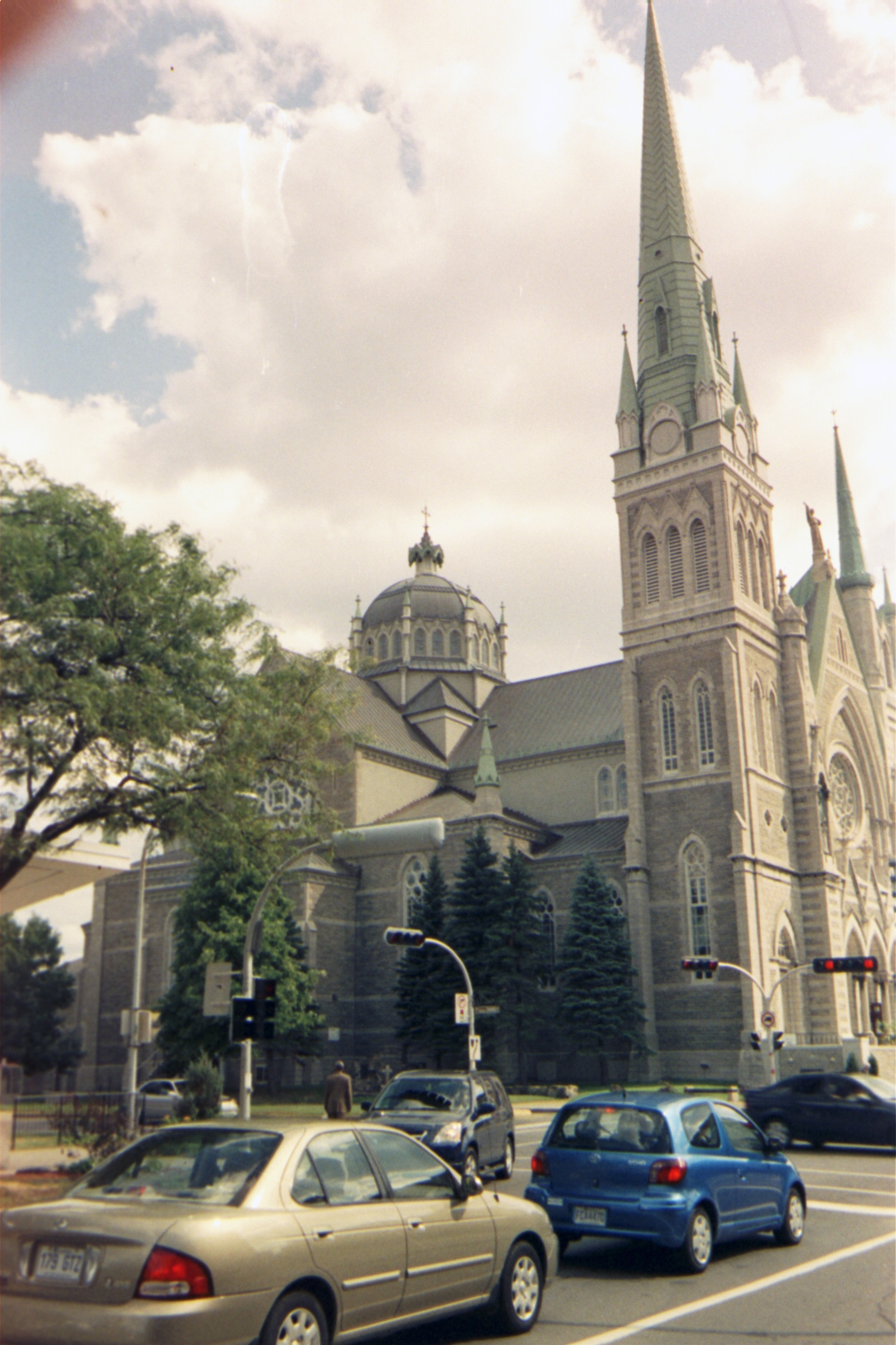 Cocathédrale Saint-Antoine-de-Padoue vue de côté, à Longueuil, dans la province canadienne du Québec. Photo prise par ADM le 24 juillet 2005. Licence